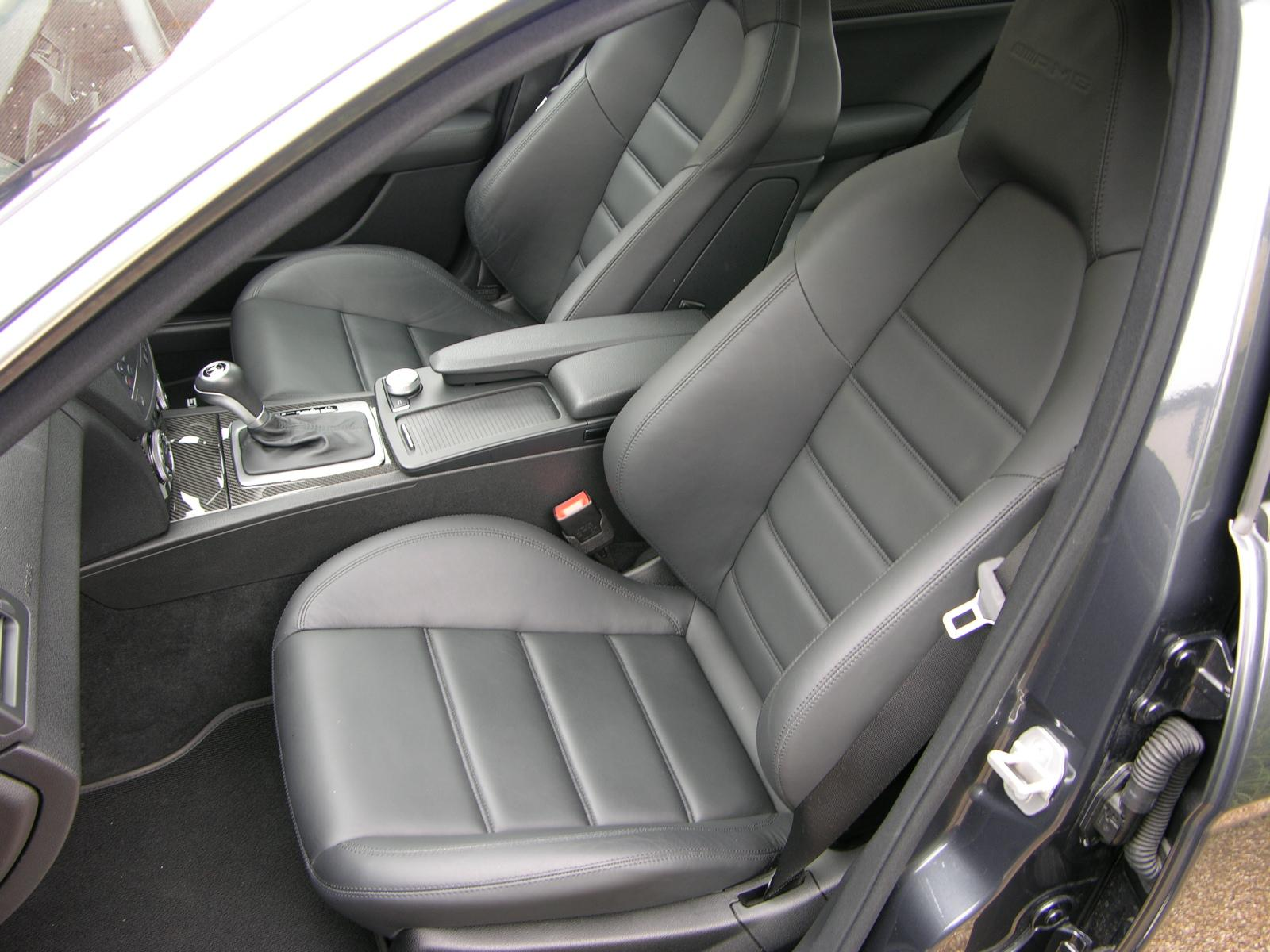 2008 Mercedes Benz C63 AMG